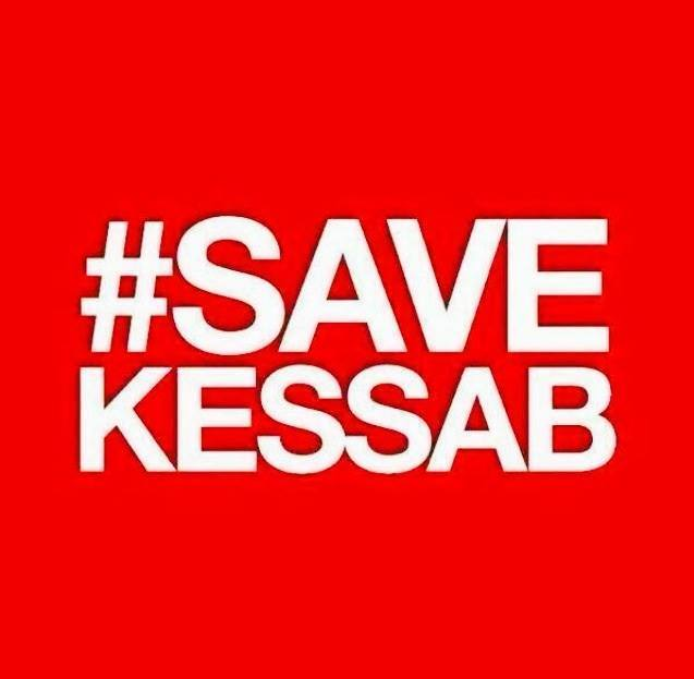 Պահպանիր Քեսաբը